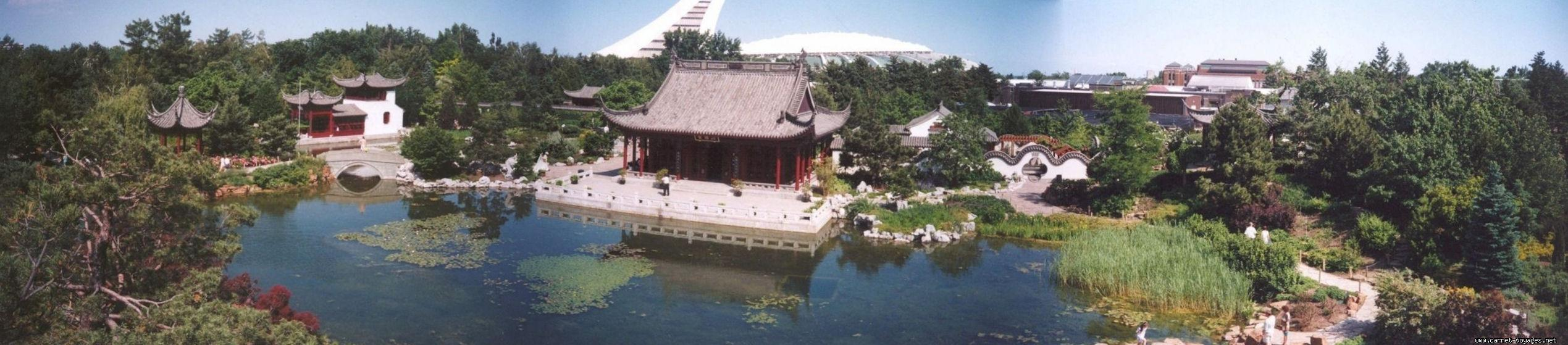 Le jardin de Chine au Jardin Botanique de Montreal.